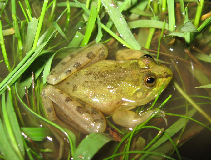 Podonectes minutus